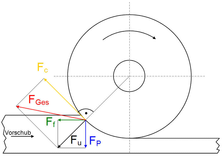 Kräfte beim Gegenlauffräsen